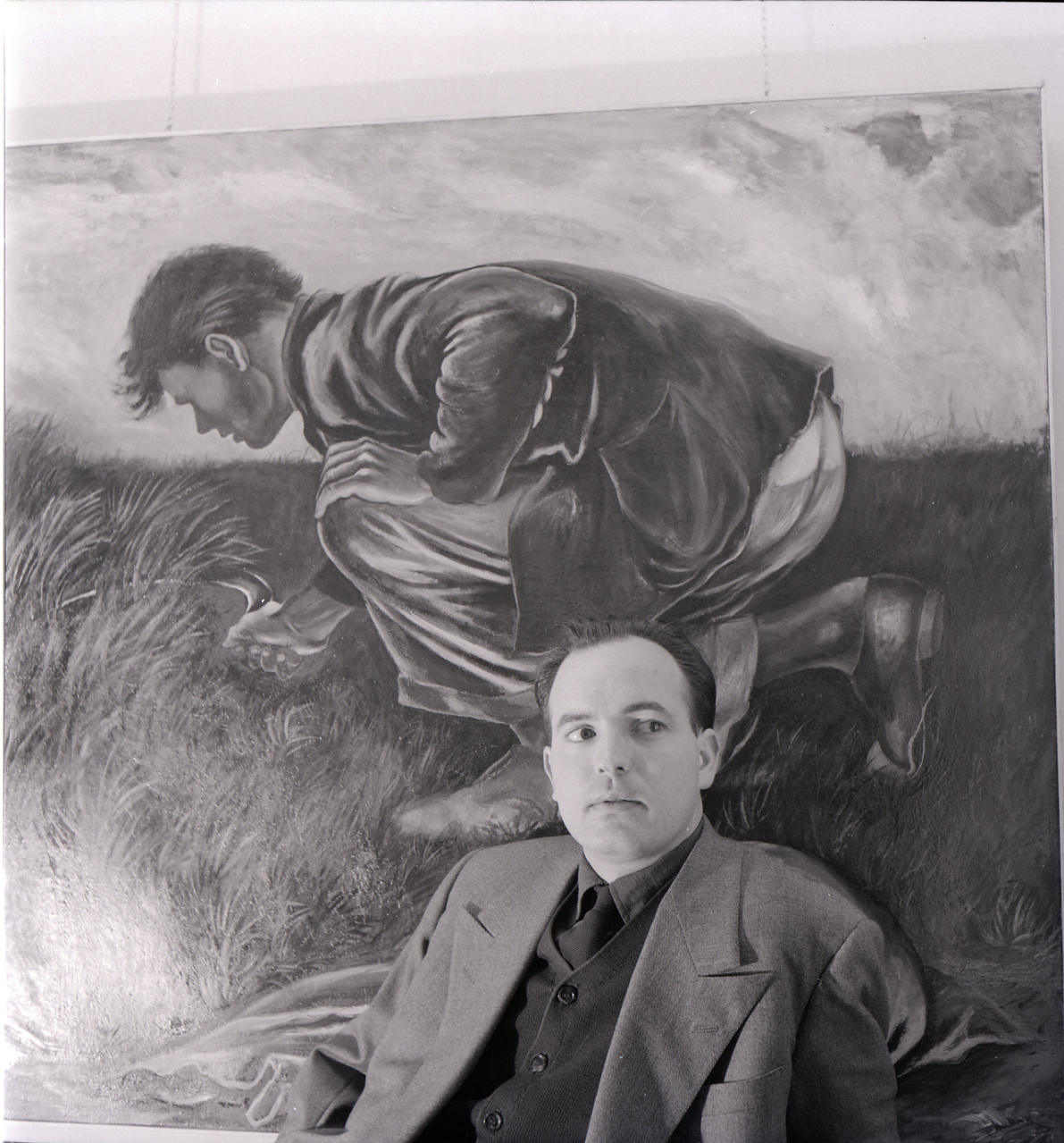 Servizio fotografico : Italia, 1982 / Paolo Monti. - Buste: 3, Fototipi: 3 : Negativo b/n, gelatina bromuro d'argento/ pellicola ; 6x6. - ((Serie costituita da 3 buste di carta, tenute insieme da graffetta, identificate con i nn.: R4544, R4545, R4546. - Sulla busta 4544: "Zigaina"